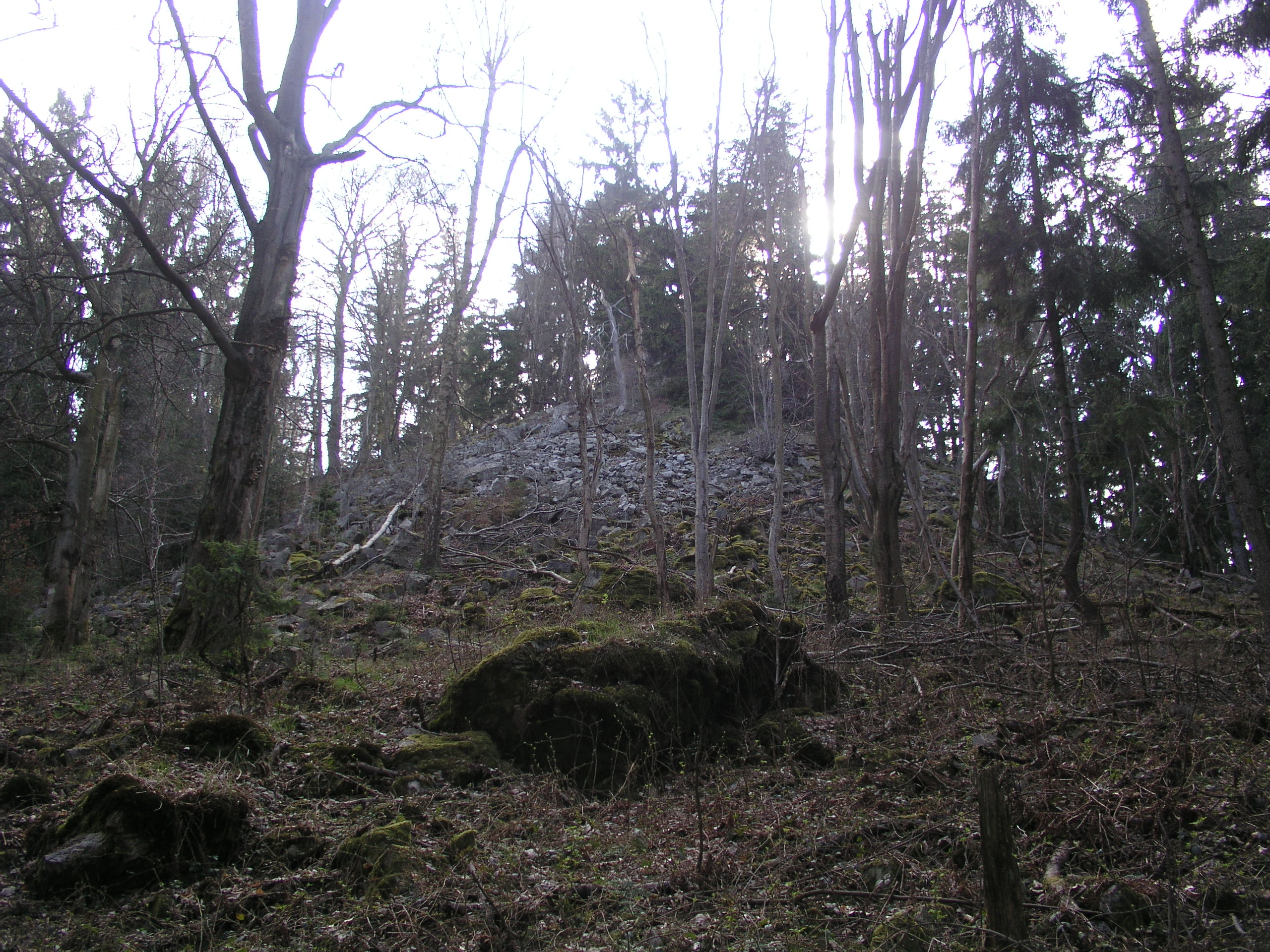 Úbočí Třemošné